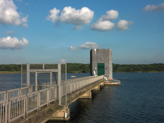 Outfall - Foremark Reservoir